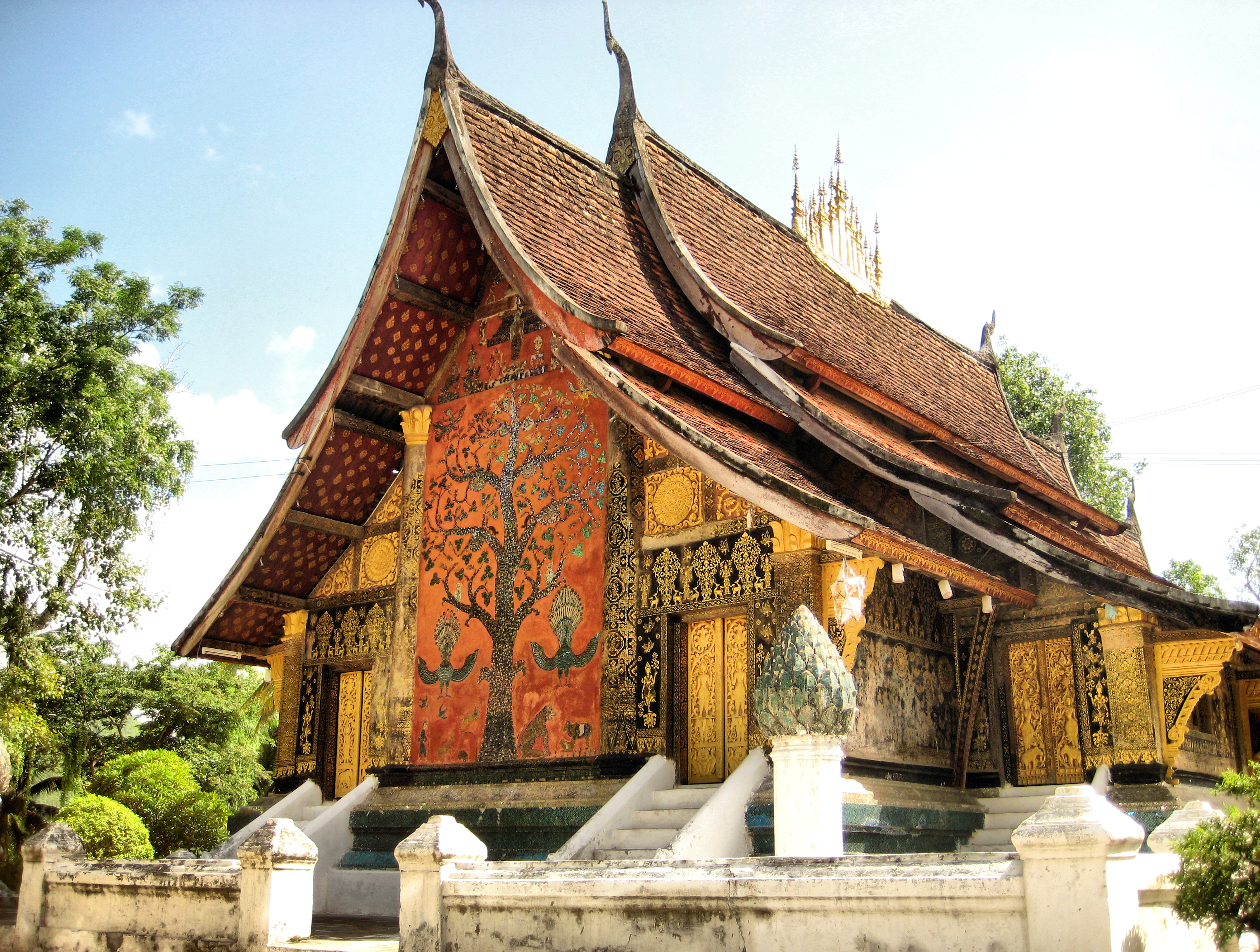 Budhism in LBP